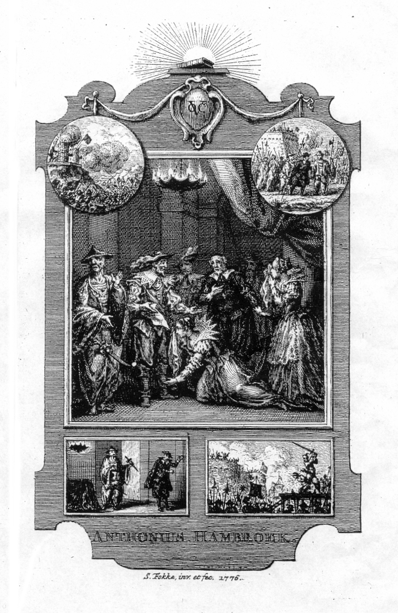 Hambroek